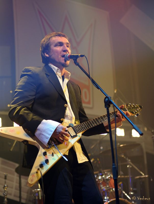 Беларуская (тарашкевіца): Піт Паўлаў на «Рок-каранацыі 2010»